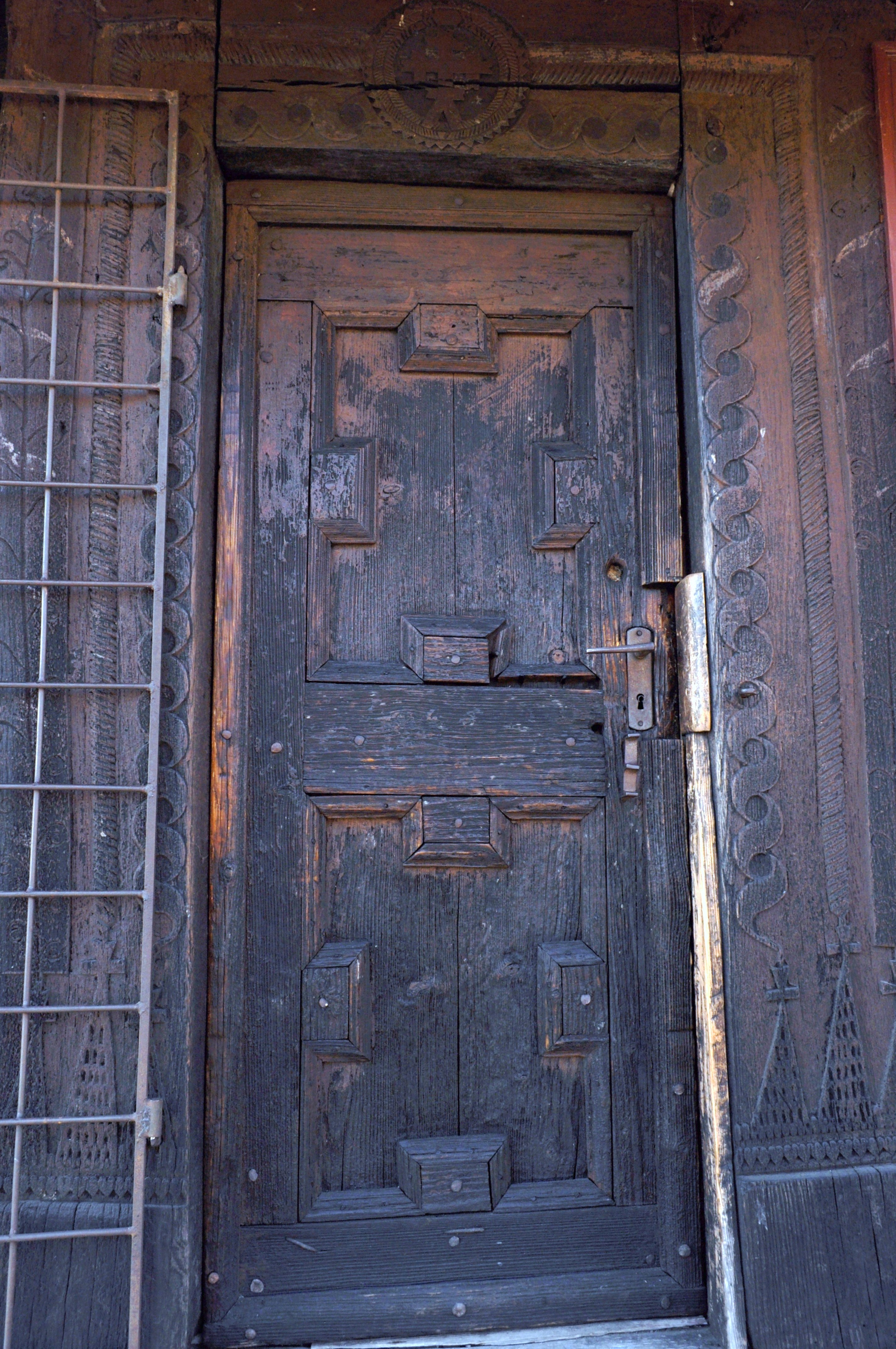 Biserica de lemn din Șilea mutată la Mănăstirea Fărău